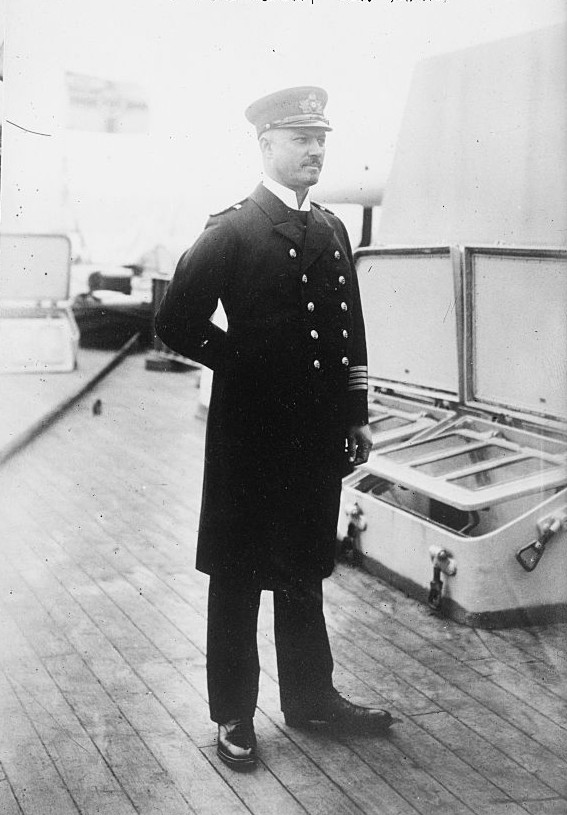 Kapitän zur See Ritter von Mann (full name: Ernst Karl August Klemens Ritter von Mann Edler von Tiechler) as captain of the German battelcruiser SMS Moltke during that ship's visit to the U.S. in June 1912.